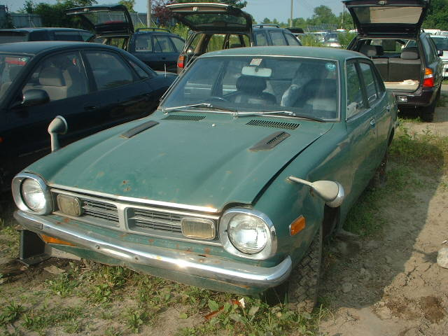 Mitsubishi Lancer(1st model).